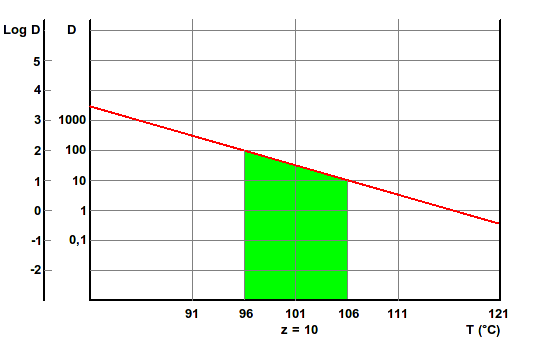 Grafico per la determinazione del valore z pere i calcoli di sterilizzazione